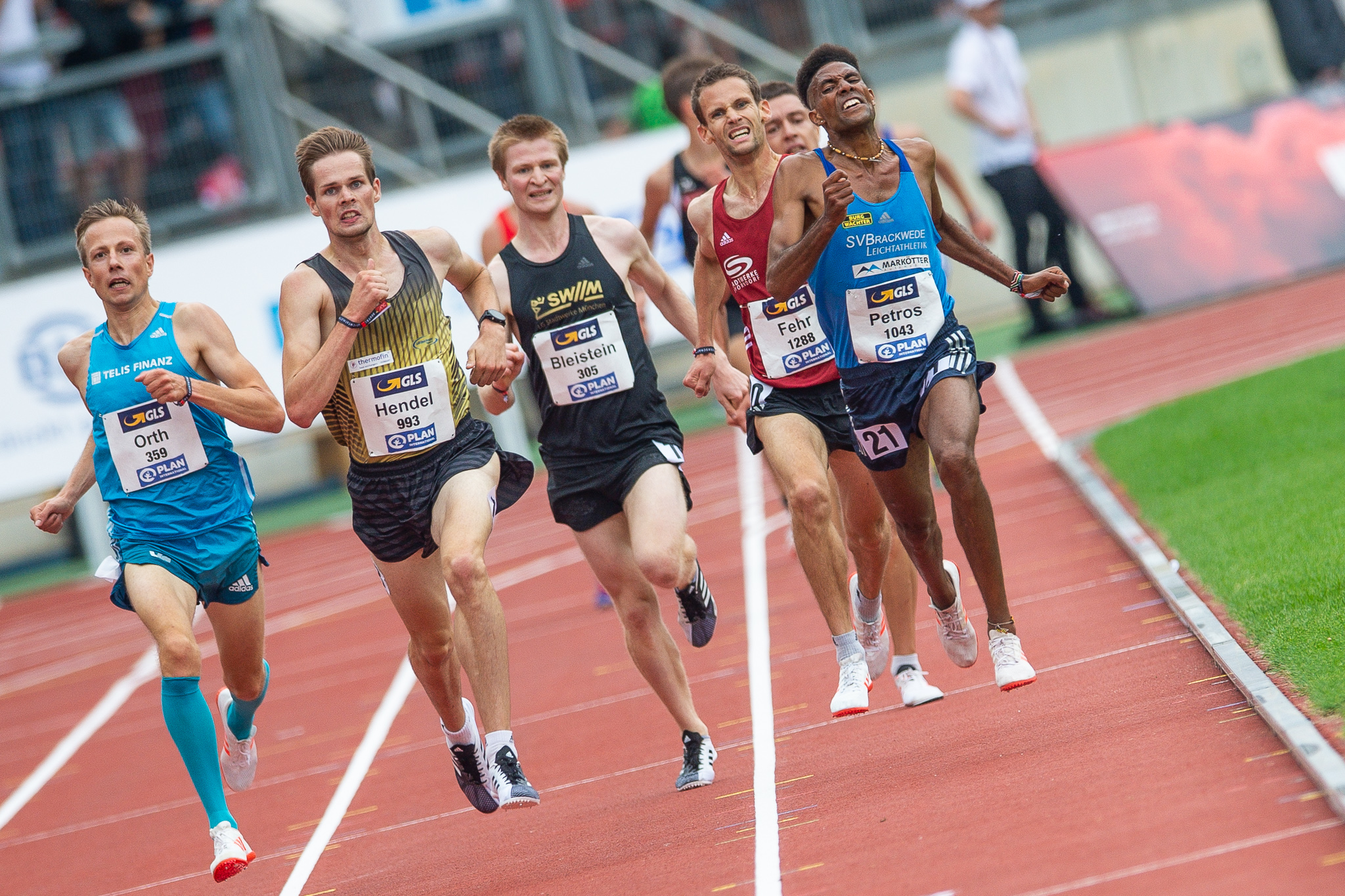 5000-Meter-Lauf,Amanal Petros,Clemens Bleistein,DLV,Deutsche Leichtathletik Meisterschaften 2018,Deutscher Leichtathletik-Verband,Florian Orth,LG Stadtwerke München,LG Telis Finanz Regensburg,LG Vogtland,Marcel Fehr,Max-Morlock-Stadion,SG Schorndorf 1846,SV Brackwede,Sebastian Hendel